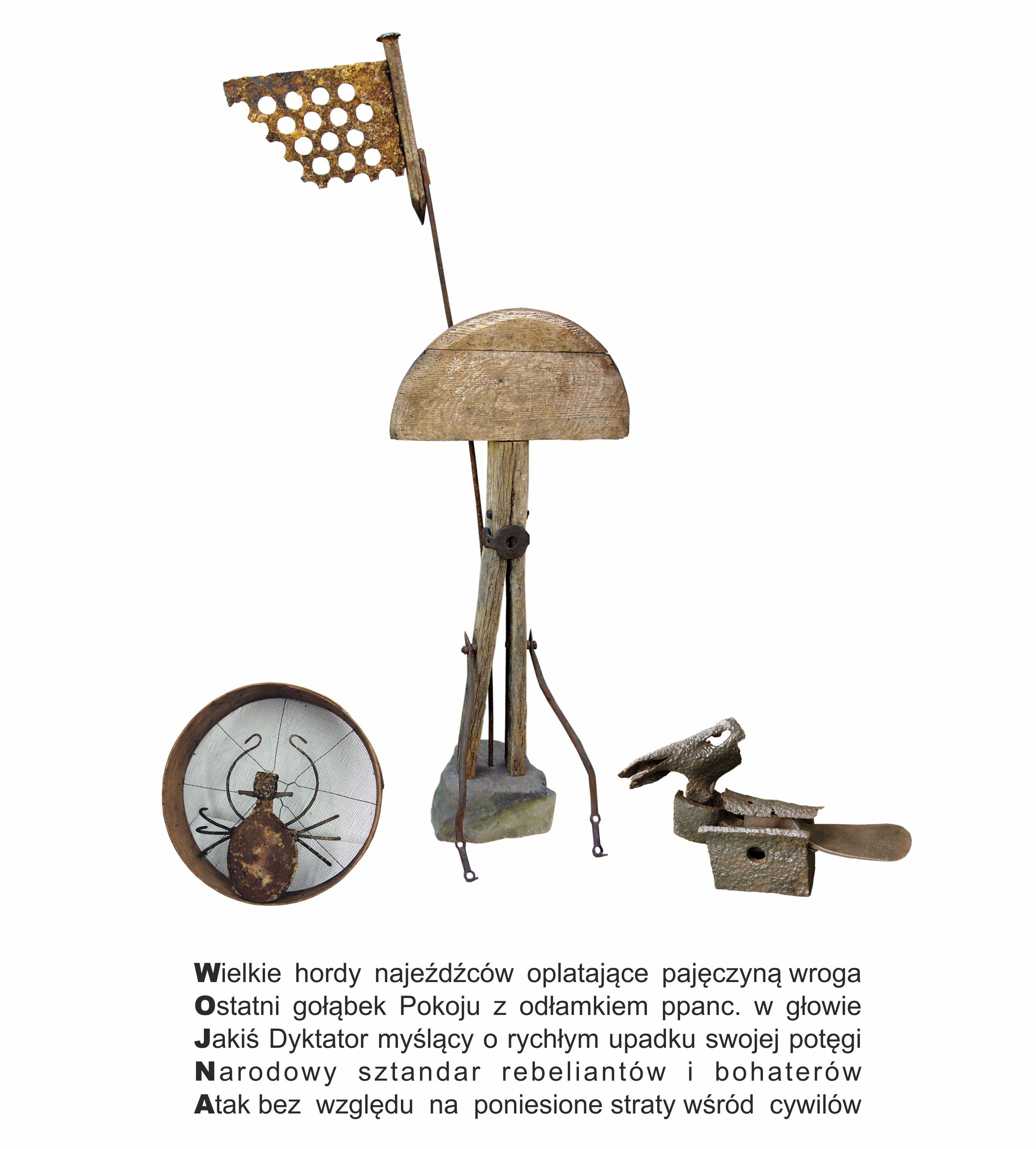 Praca Piotra Burgera przedstawiająca manifest przeciw wojnie